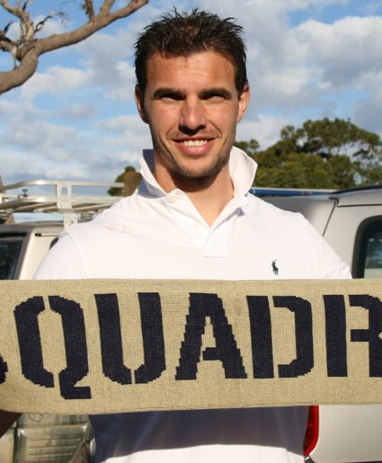 Ante Covic